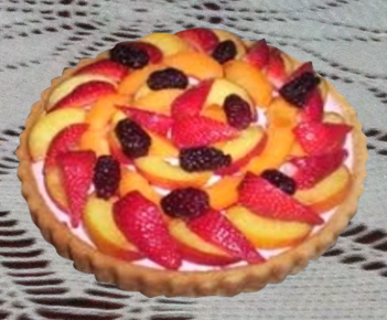 تارت بالفراولة - طبق حلويات